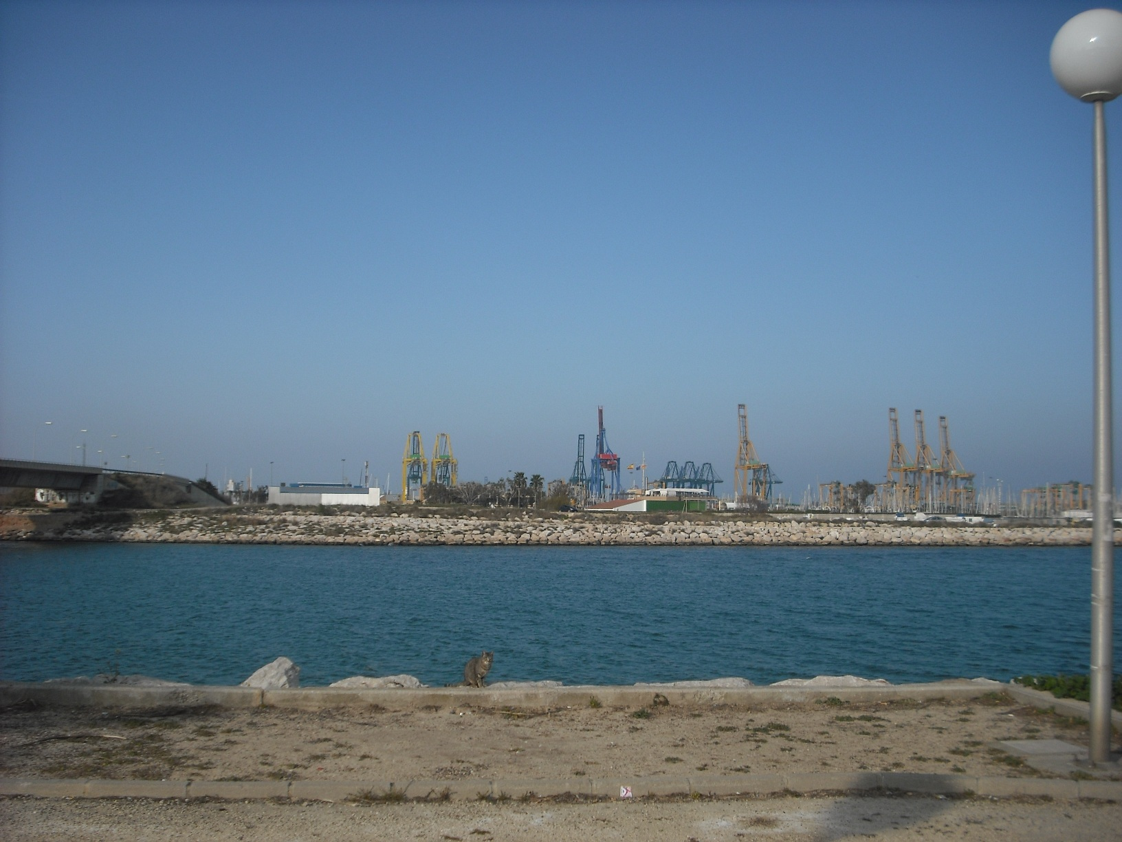 Desembocadura del nou llit del riu Túria amb el port de València al fons.